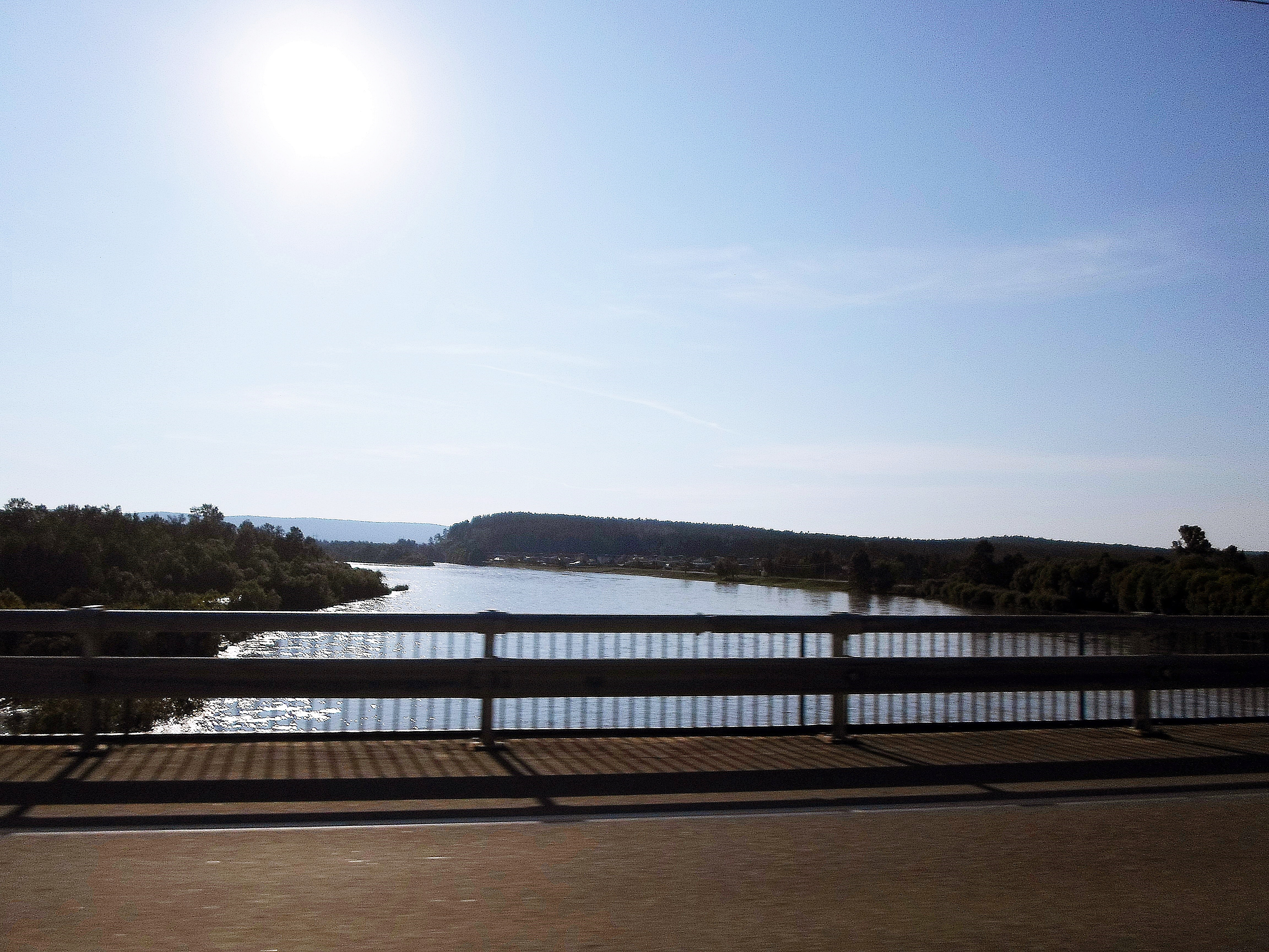 Река Иркут. Вид с моста федеральной трассы Р255 "Сибирь" (обход города Иркутск). На берегу вдали - посёлок Пионерск. Шелеховский район Иркутской области.